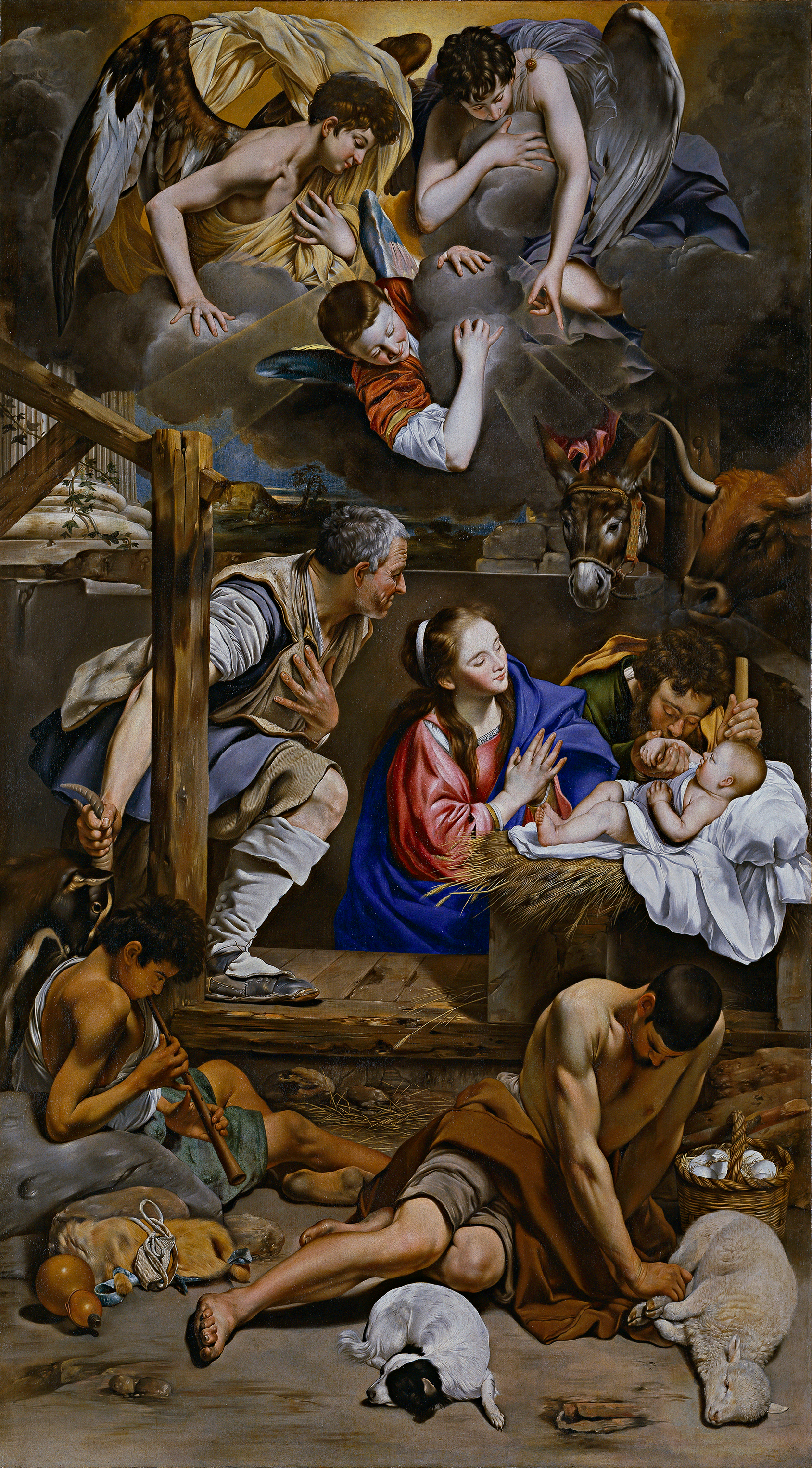 La obra representa el momento en que el Niño Jesús fue adorado por los pastores de Belén poco después de su nacimiento.